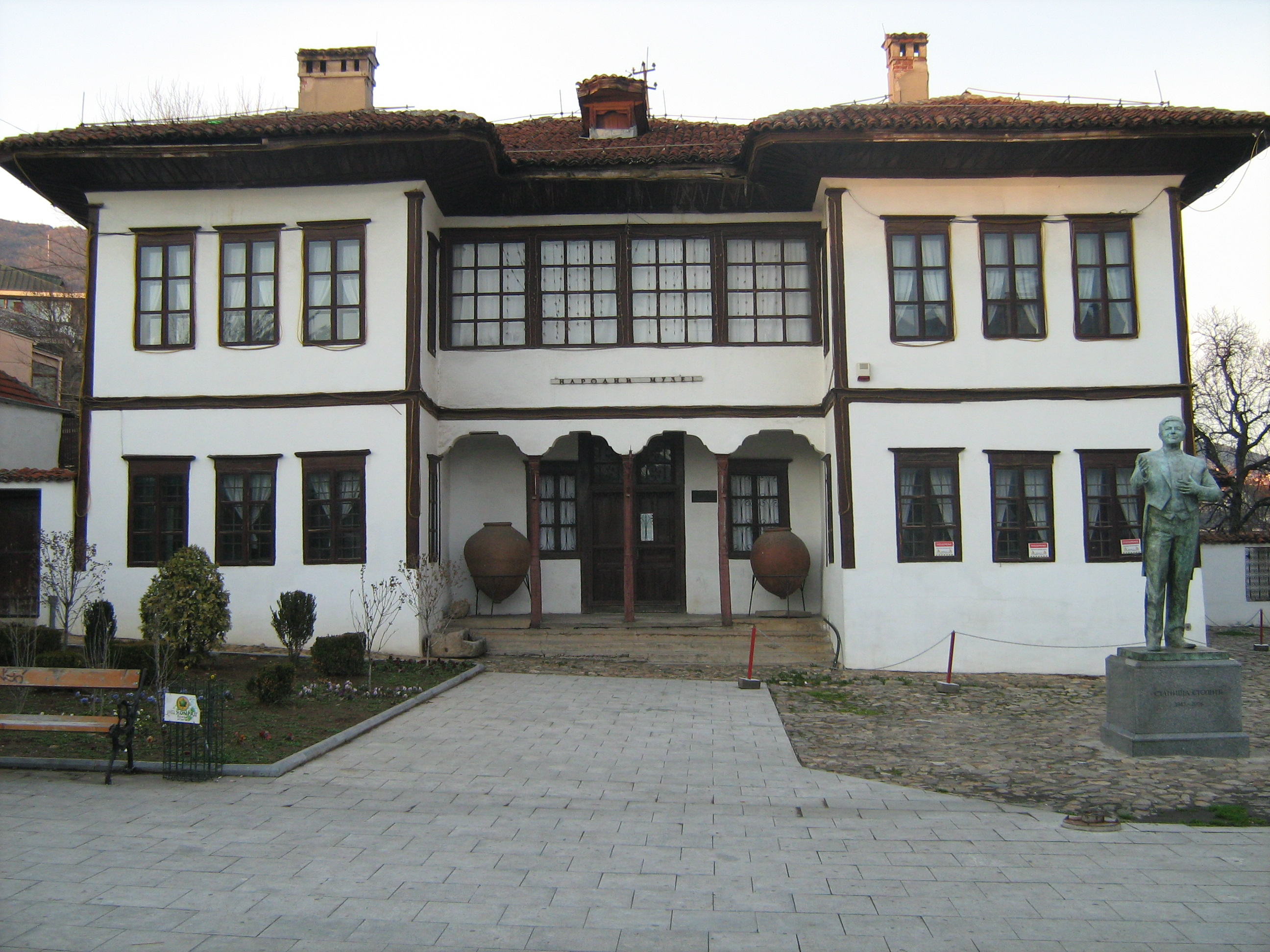 Пашин конак - салемлук, зграда Народног музеја у Врању